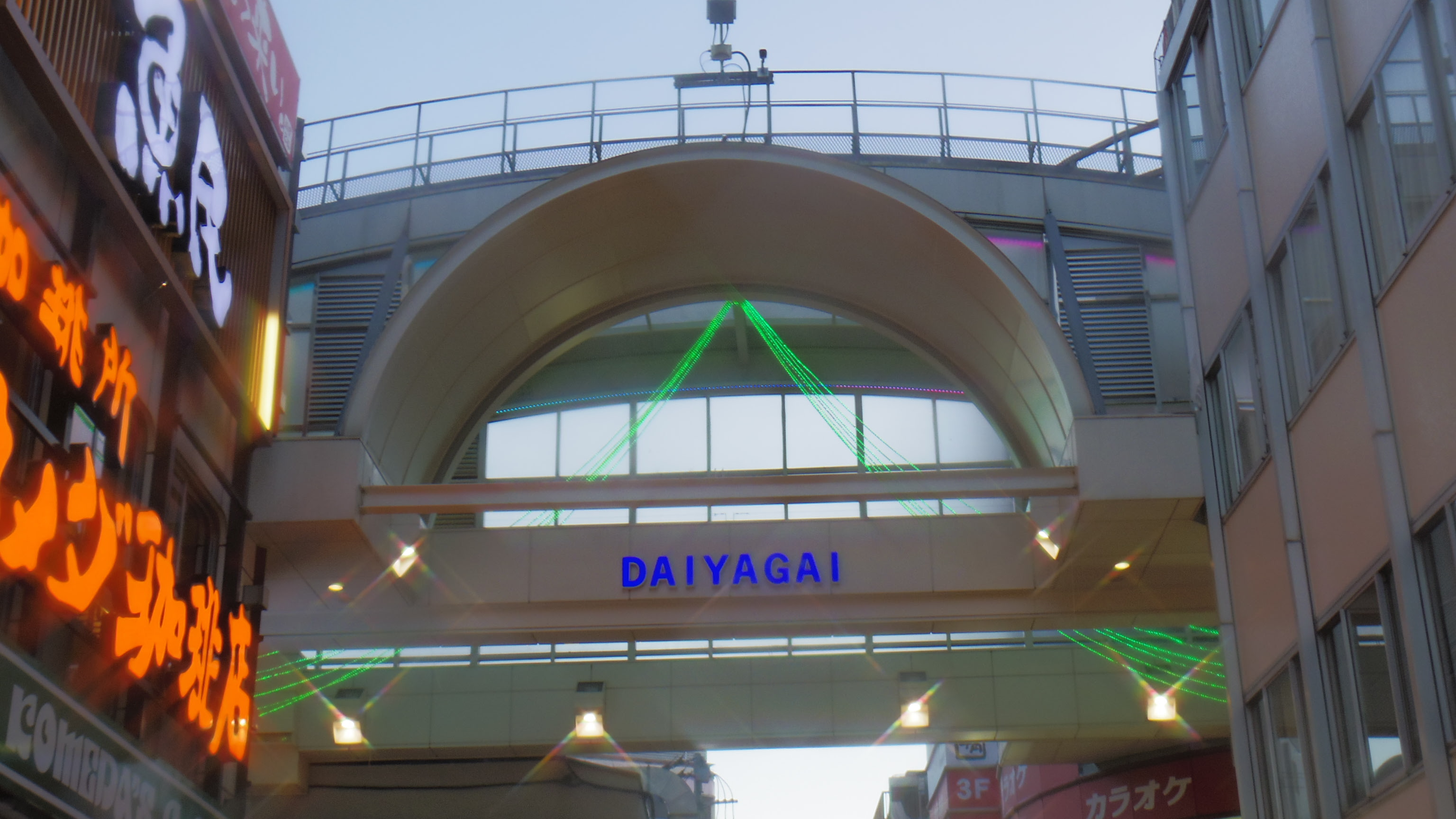 吉祥寺ダイヤ街のドーム部分。「クリスマスフェア」開催中で、イルミネーション装飾が施されている。 左手前には「魚民」「コメダ珈琲店」がある。 2016年11月撮影。